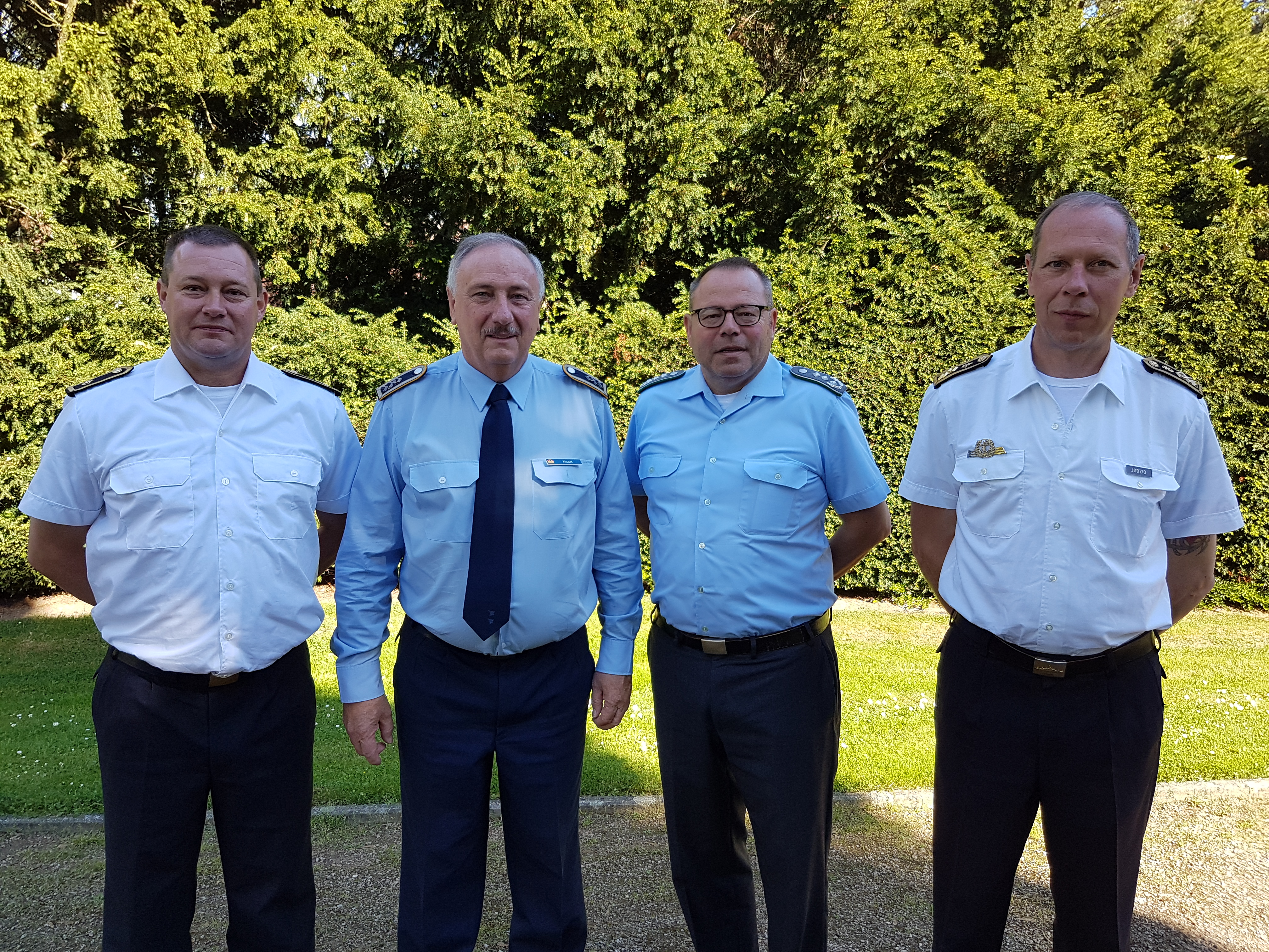 Die deutsche CISOR Delegation bei der Frühjahrstagung für die Internationale Reservistenarbeit am 20.05.2017 in Bonn ( von links): SU d.R.Nils Kersten, StFw d.R. Reinhard Knott ( Vizepräsident CISOR) Oberst d.R.Dr. Hans-Jürgen Schraut ( Vizepräsident Internationale Arbeit) und HptBtsm d.R. Joachim Jodzio.